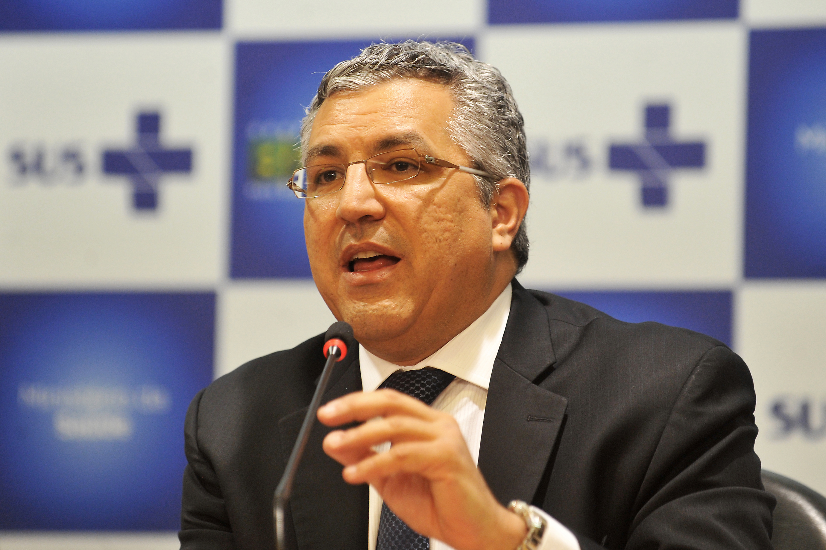 Brasília - A pesquisa Vigitel (Vigilância de Fatores de Risco e Proteção para Doenças Crônicas por Inquérito Telefônico), que coletou informações em 26 capitais brasileiras e no Distrito Federal e mostra como está a saúde dos brasileiros, o ministro da Saúde, Alexandre Padilha, detalha questões relativas à alimentação inadequada e a saúde da mulher